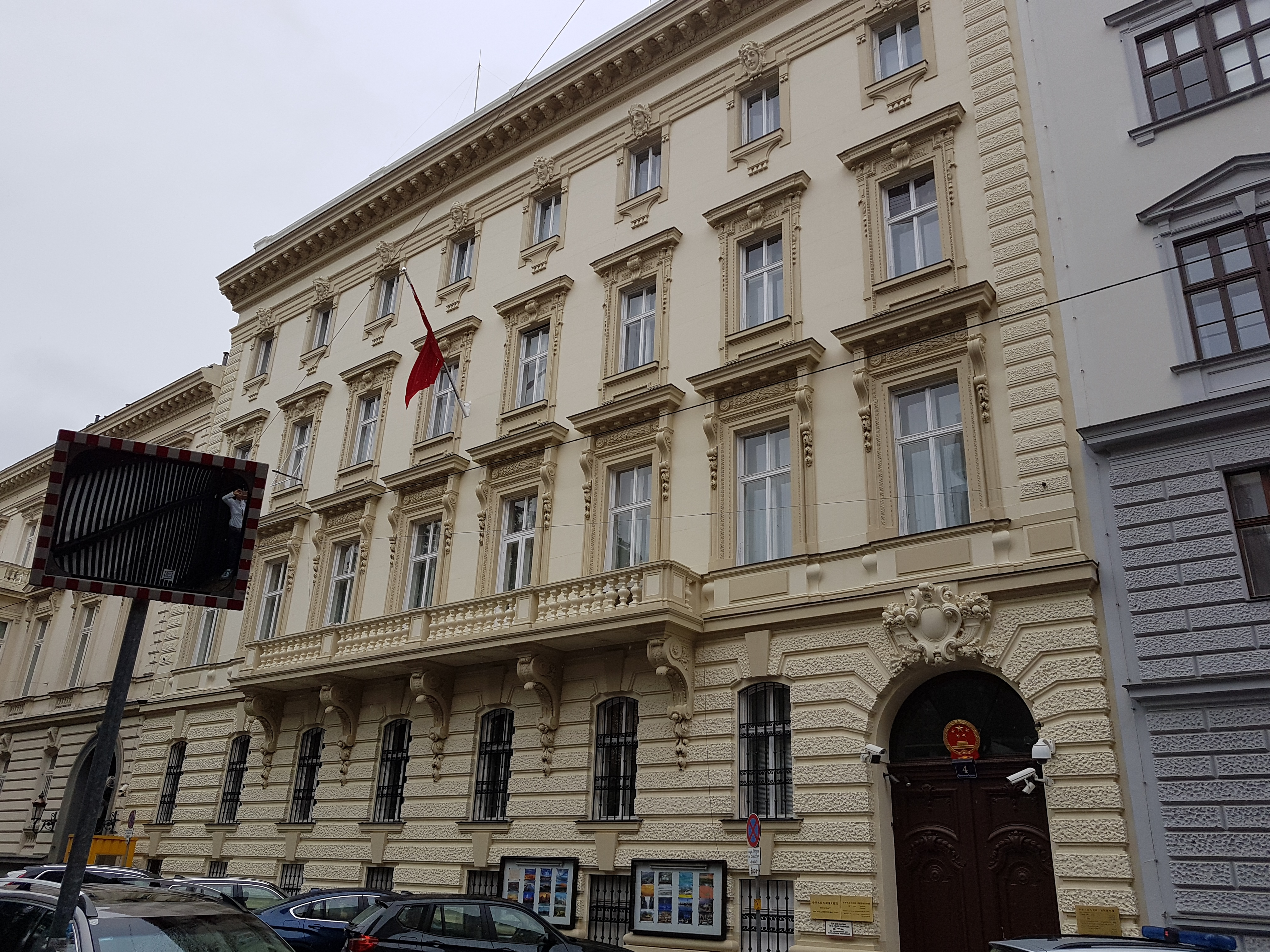 Wien-Landstrasse, Metternichgasse 4, Palais Bratmann-Thorsch, in dem neobarocken Bau befindet sich die Chinesische Botschaft.